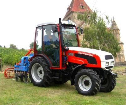 Dexheimer 508Si 80PS mit hydr. verstellbarem Tiefengrubber